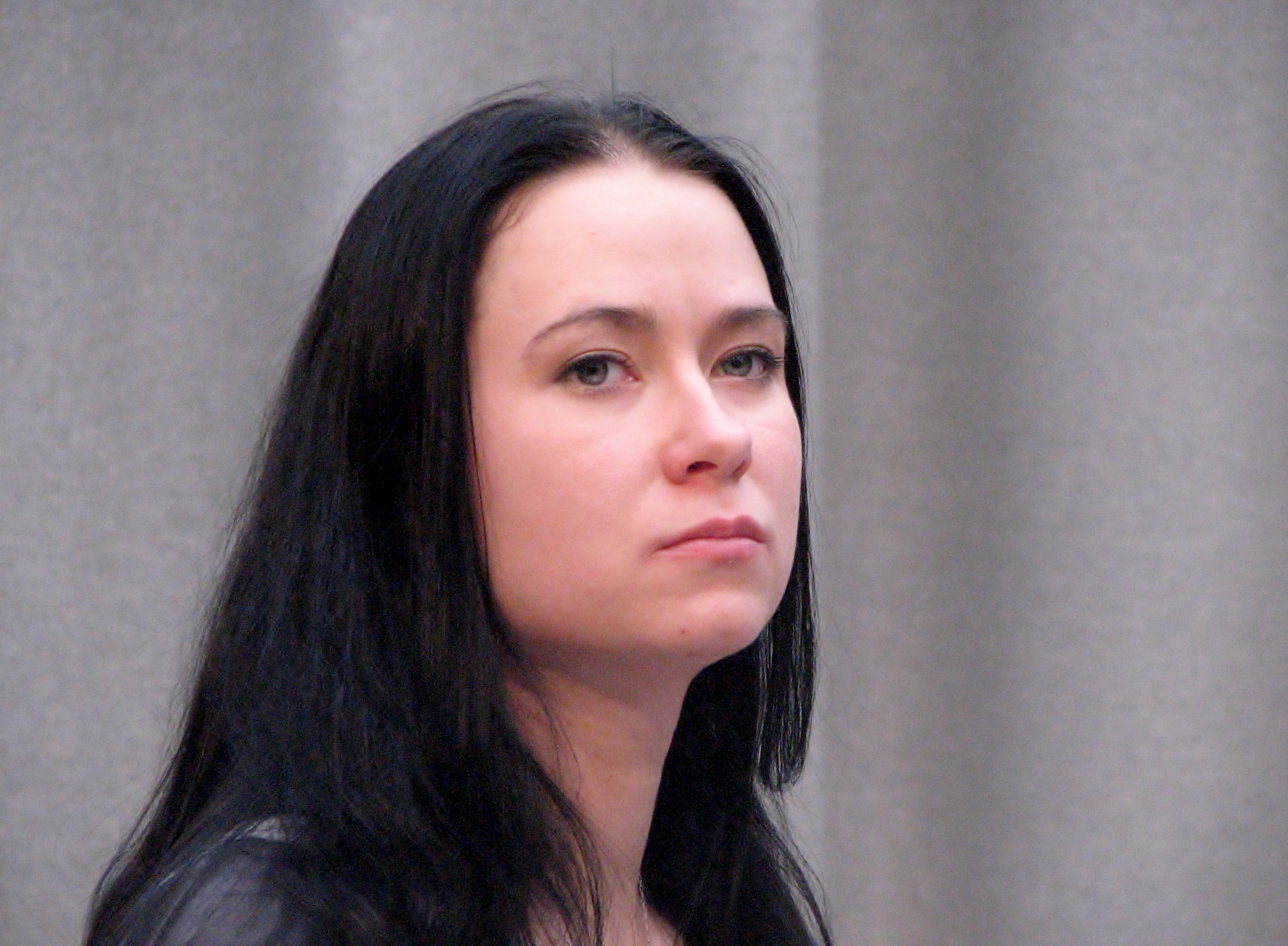 Liina Viru autogrammitunnis Estonia talveaias